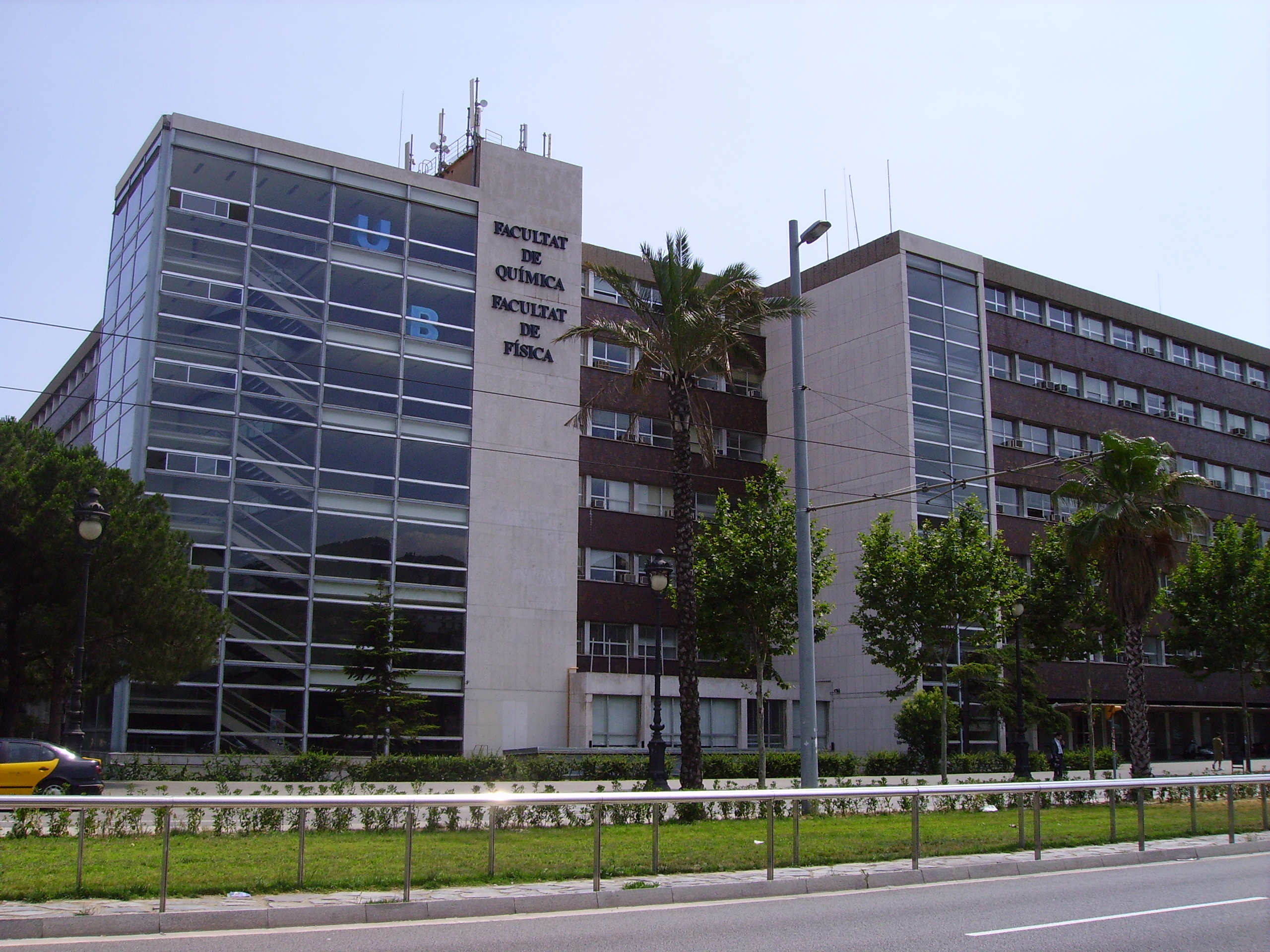 Facultat de Química i Física de la Universitat de Barcelona (UB), Avinguda Diagonal, Barcelona, Catalunya.